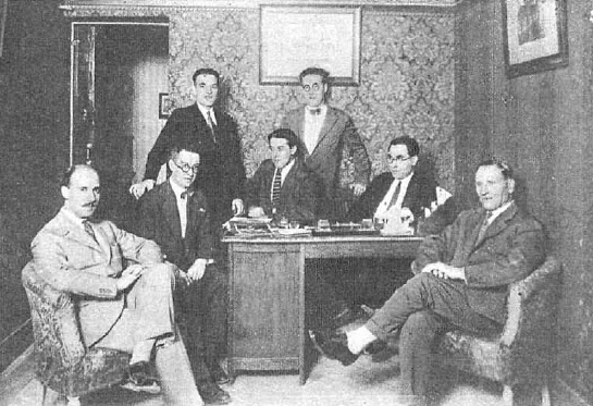 Fotografía de 1927 que muestra a redactores de la revista española Popular Film reunidos con directivos de la empresa cinematográfica Producciones ELA. Sentado, segundo por la izquierda, está el periodista Mateo Santos.